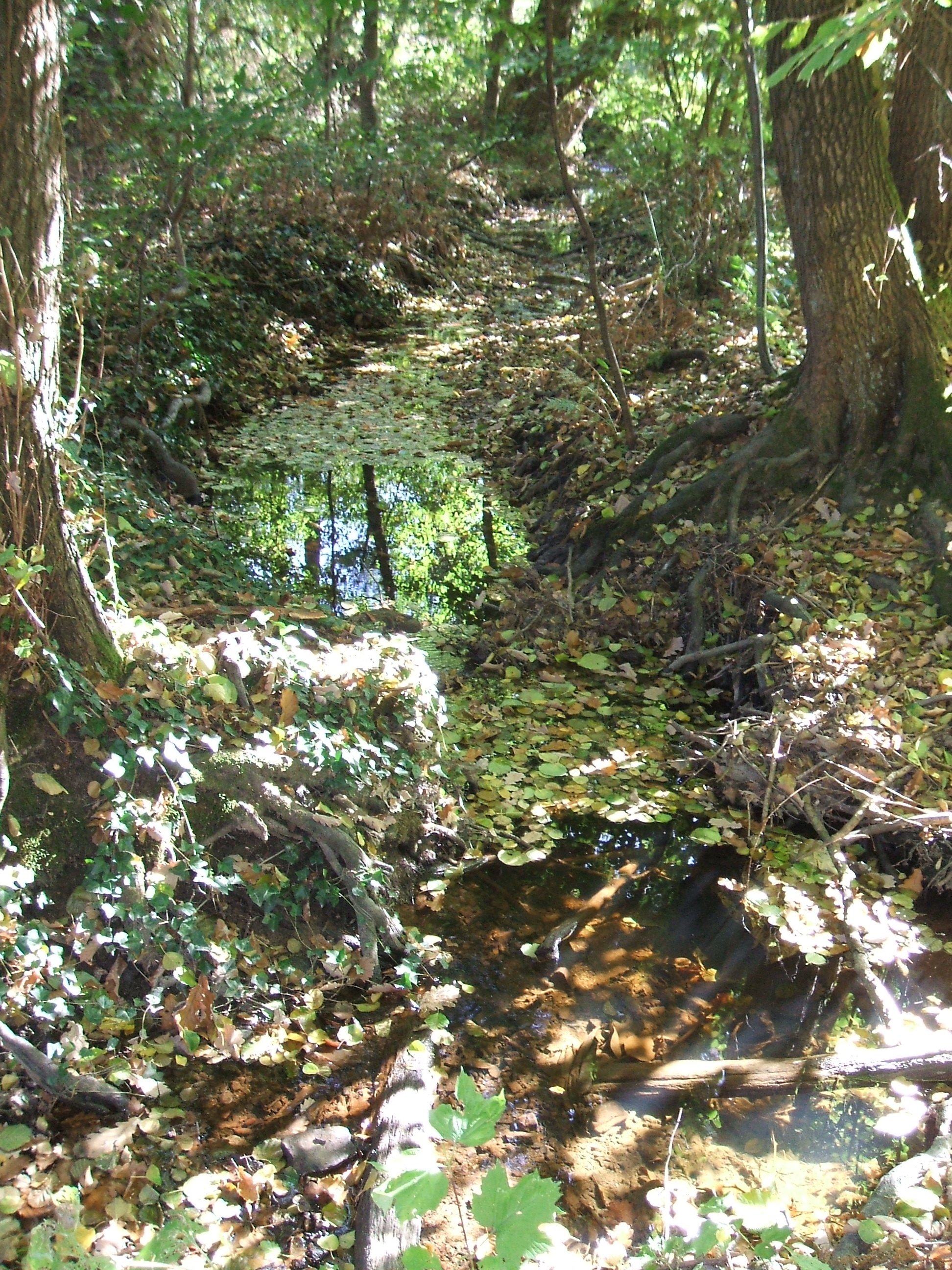 Träger Fluss des Seebachs/Leihgrabens hinter den Wetterauer Werkstätten